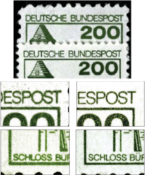 Fälschung zum Schaden der Post der Marke der Deutschen Bundespost Mi.-Nr. 920: Oben Fälschung, darunter echte Marke. Unten und Mitte links die Fälschung, rechts die echte Marke.